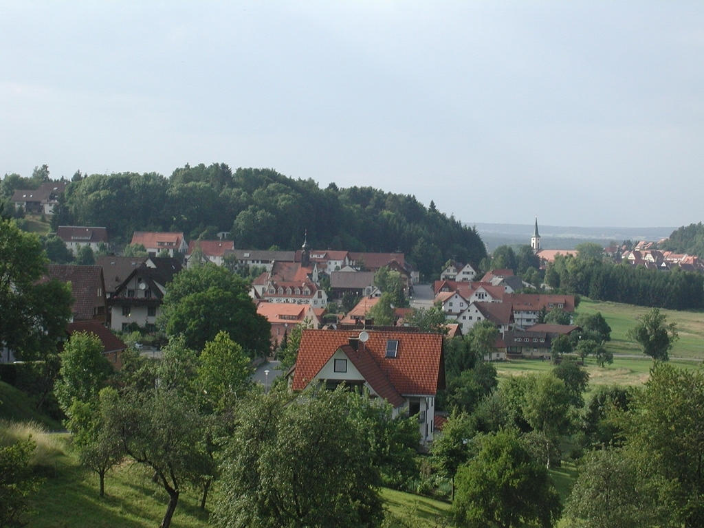 Loeffingen Seppenhofen